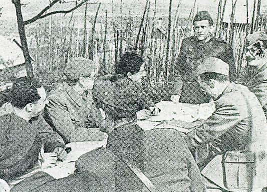 Zasedanje Slovenskega narodnoosvobodilnega sveta